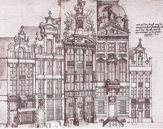 Maisons de la Grand-Place de Bruxelles, d'après F.J. De Rons dessins et aquarelles exécutés de 1729 à 1749. De gauche à droite: Le Mont Thabor, La Rose, L'Arbre d'Or, Le Cygne, L'Étoile.